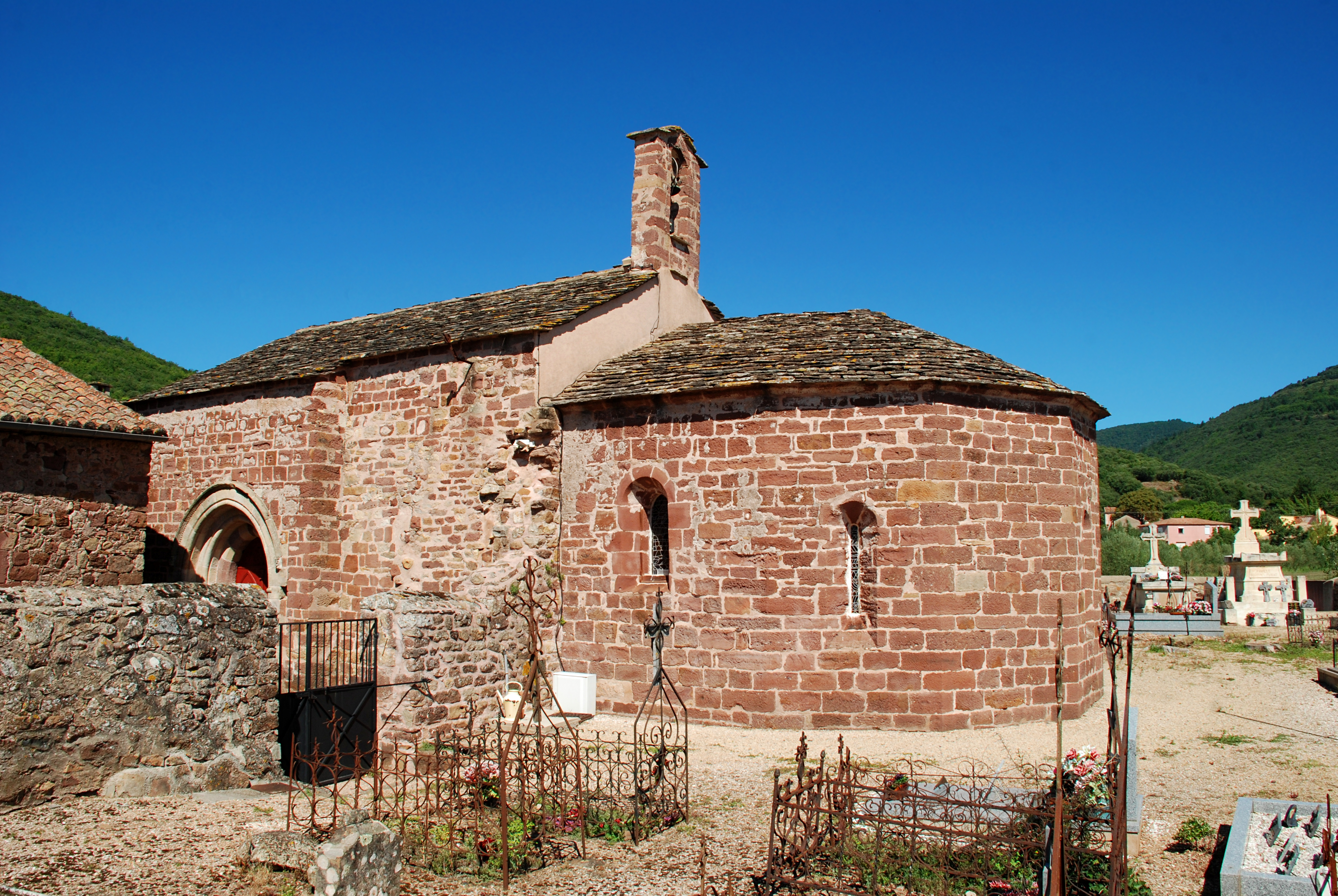 France - Languedoc - Hérault - La Tour-sur-Orb - Église Sainte-Marie de Frangouille